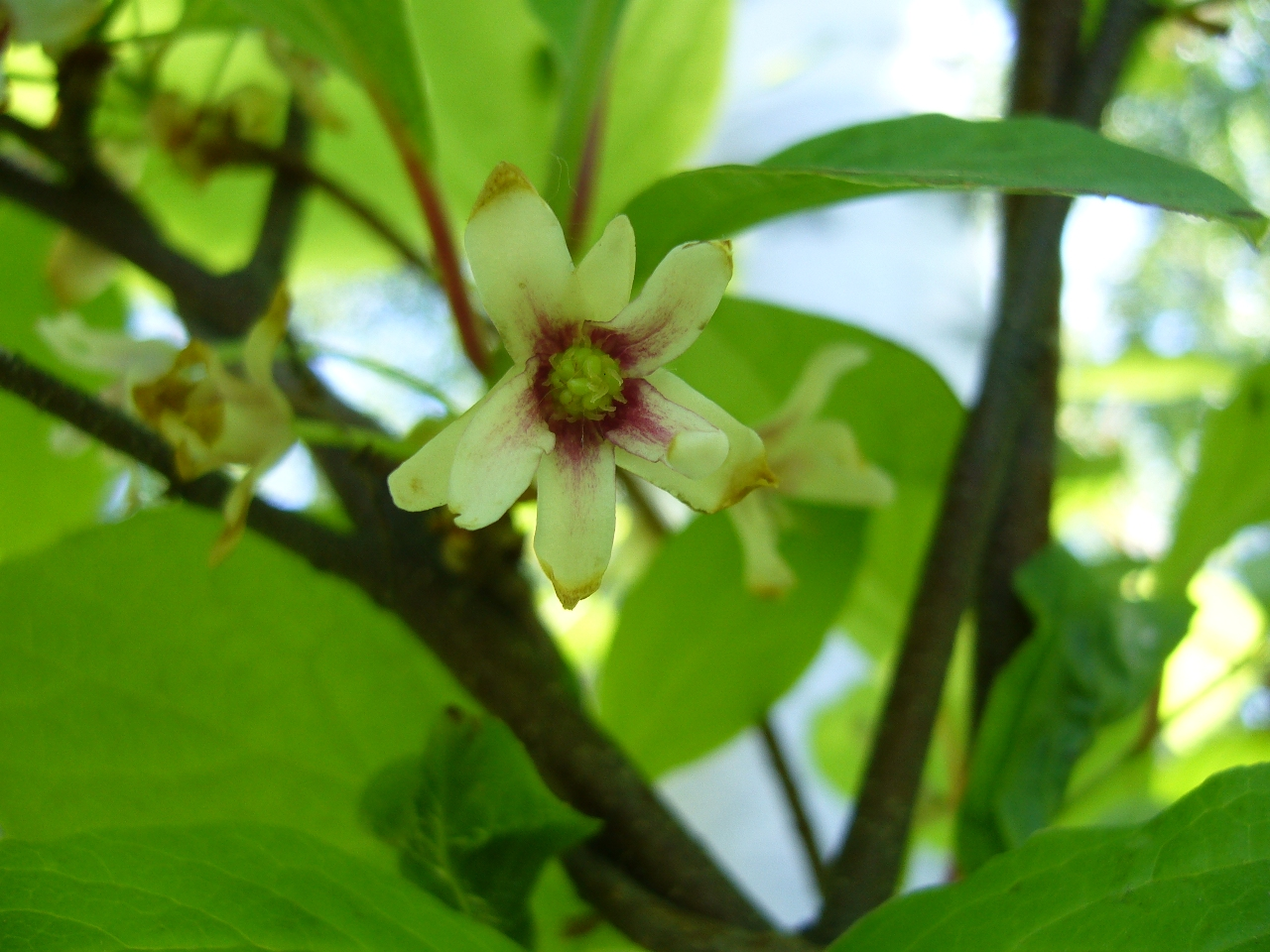 цветок Лимонника китайского, Сахалин